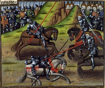 Bibliothèque Nationale de France Manuscrits occidentaux Français 59 Fol. 170v Raoul Lefèvre, Histoires de Troyes, Belgique, XVe Comment Hercules et Theseus se combatirent contre deux damoiselles de Sychie Combat de Thésée, Hercule et des Amazones